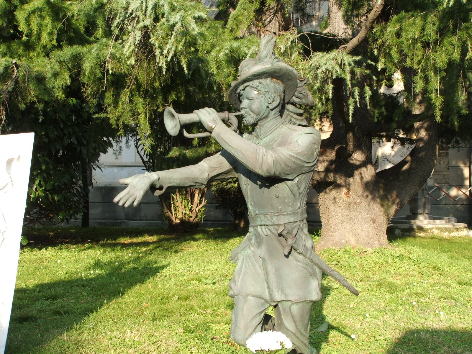 Cimitero monumentale di Staglieno, Genova. Statua ai bersaglieri. Opera dell'artista contemporaneo Fiorenzo Bacci. Mia riproduzione fotografica dell'opera autorizzata dall'autore. Riferimenti: Fiorenzobacci.it francesca_bacci at yahoo dot com